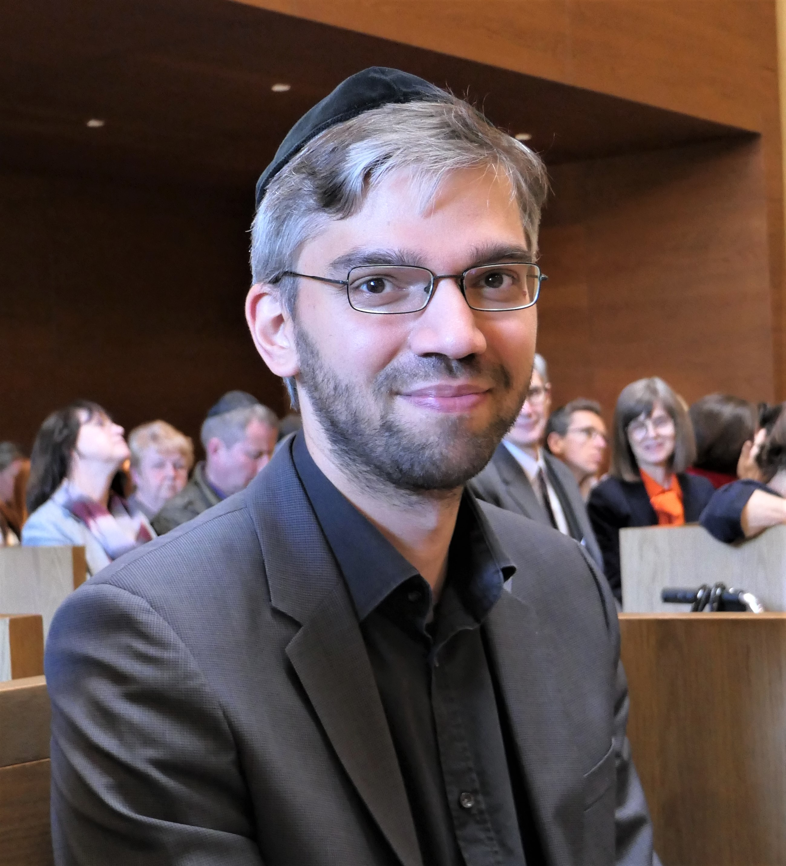 Alexander Nachama, Rabbiner